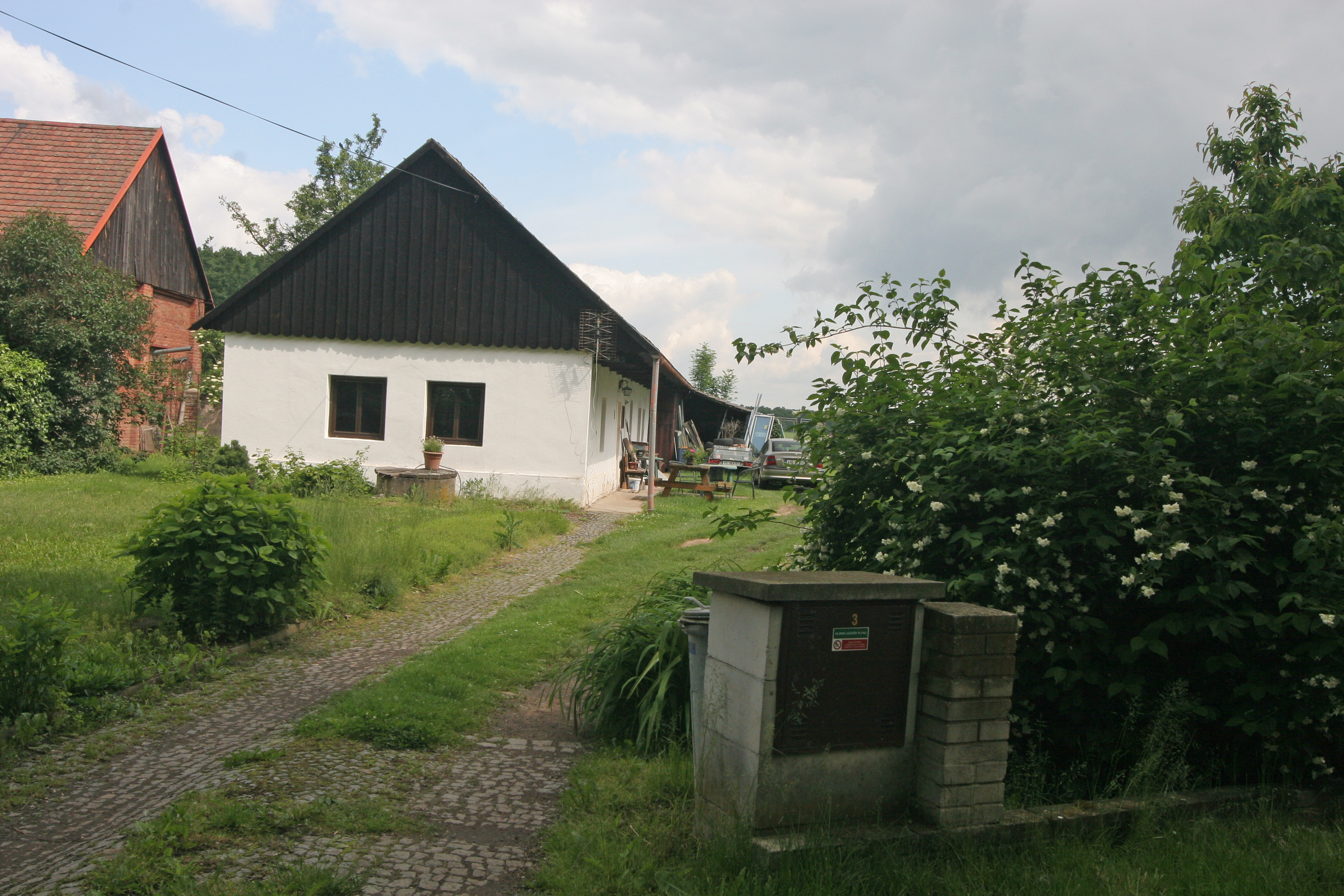 Komárov čp 3